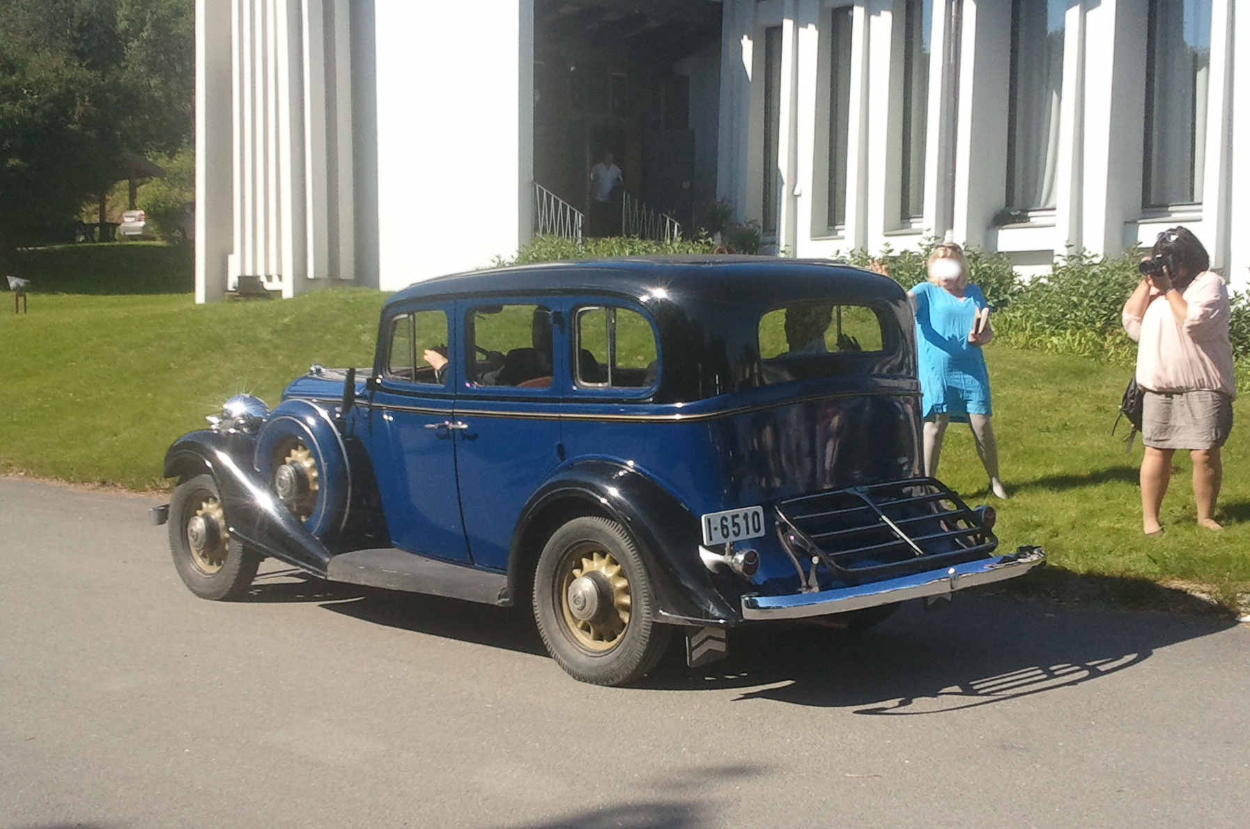 Hamsuns bil, utenfor Presteid kirke i Hamarøy juli 2013